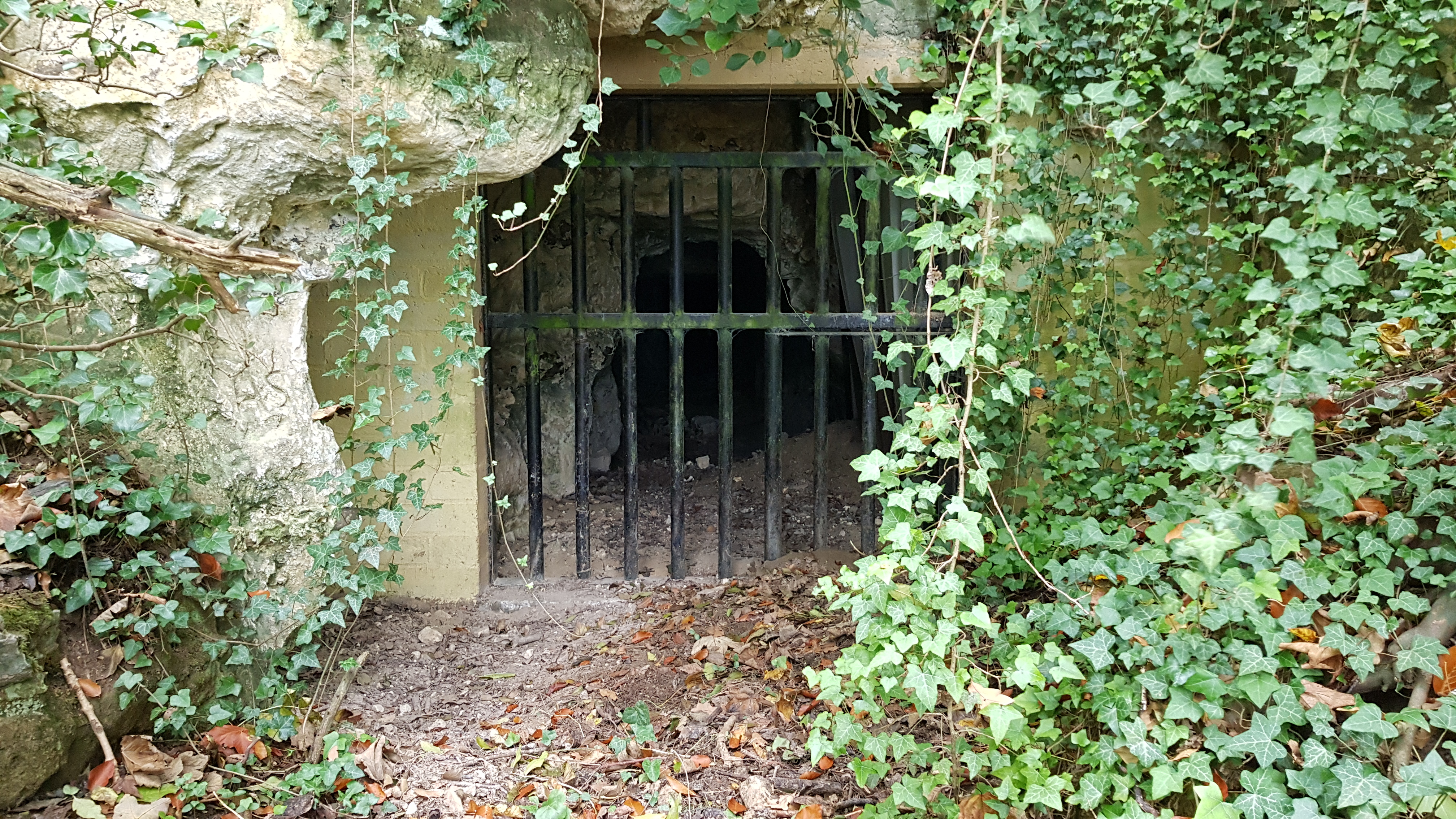 Sint-Jansboschgroeve V, Oud-Valkenburg, Nederland